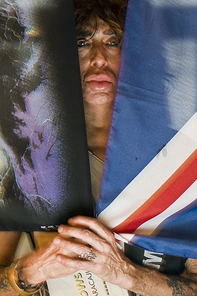 Na minha humilde opinião acho que todos que realmente gostam de rock´n roll deveriam visitar o Templo do Rock que é a casa do Serguei em Saquarema, este jovem que está prestes a completar 75 anos no próximo mês tem histórias intermináveis sobre o assunto e fotos penduradas por toda parte que com certeza vão fazer vocês se arrepiarem como aconteceu comigo quando vi uma dele junto com Janis Joplin e Jimmy Hendrix.